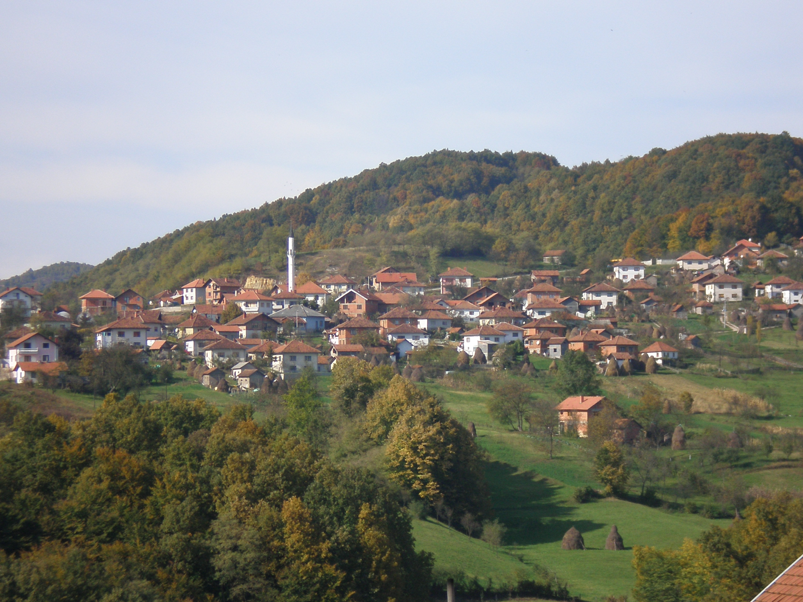 Stjepan polje, mahala Dedici